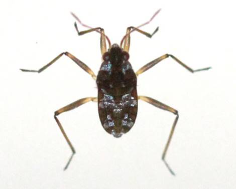 Photo de Microvelia americana, une espèce membres des Microveliinae vivant en Amérique du Nord.